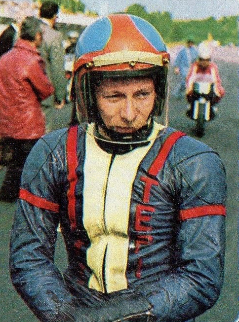 CAMPIONI dello SPORT 1973/74-Figurina n.210- LANSIVUORI-FINLANDIA-MOTOCICLIS